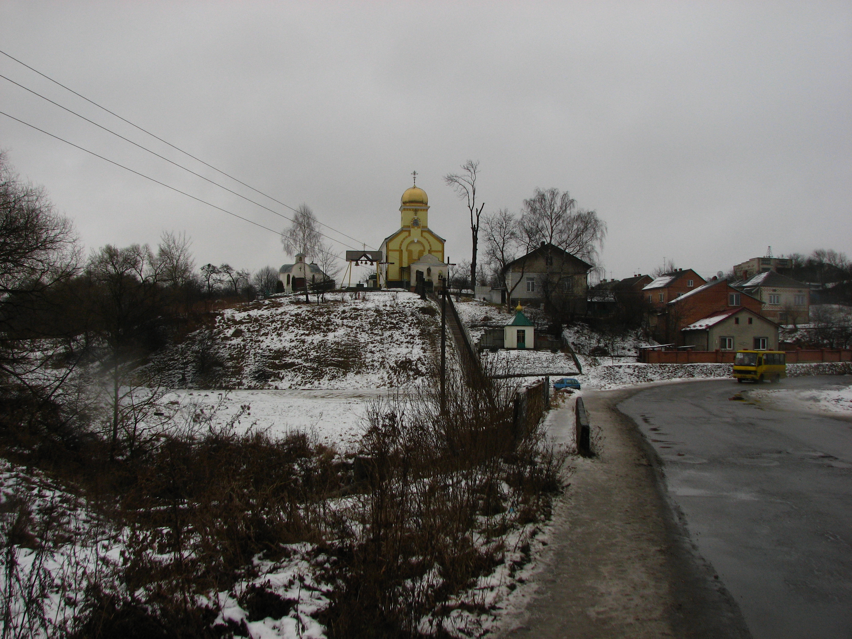 Храм Воздвиження Чесного Хреста УГКЦ